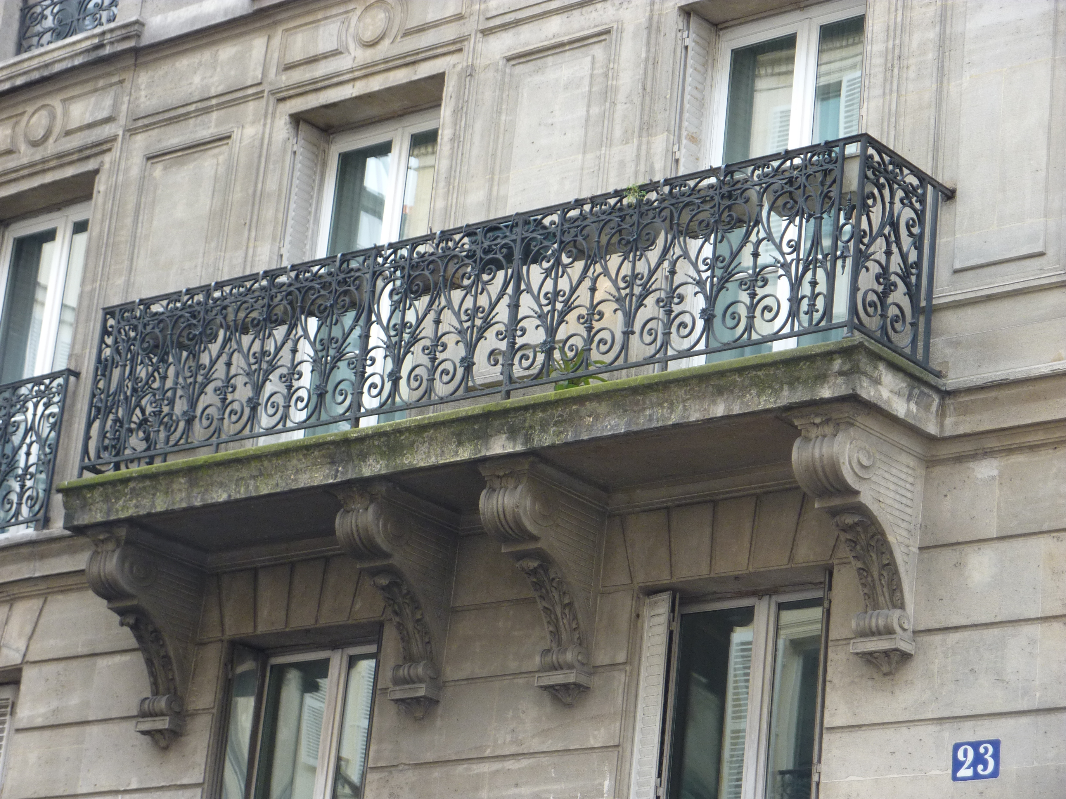 Rue du Château d'Eau, Paris 10ème